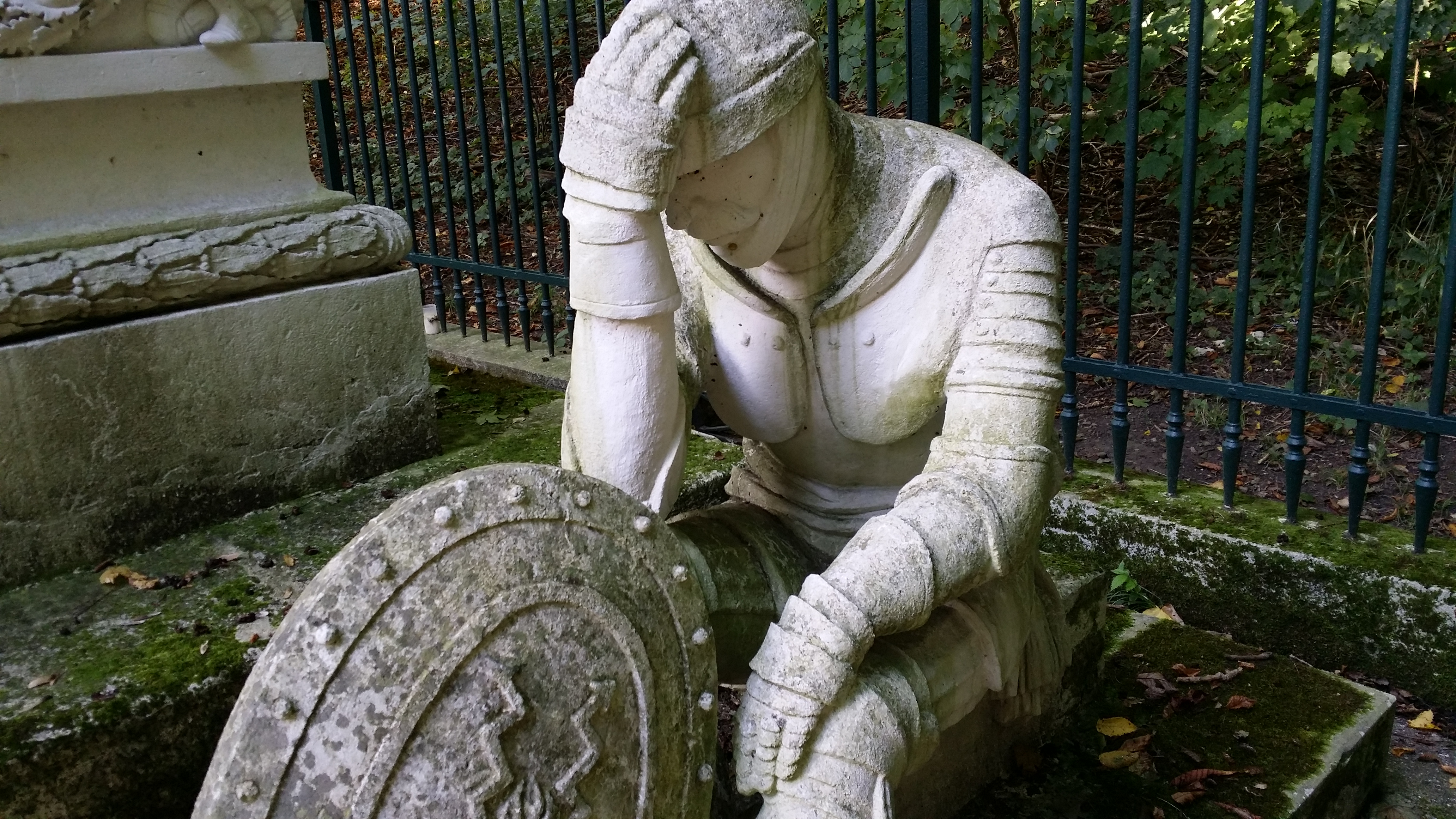 In Wien 14, Mauerbachstraße Siehe Wikipedia Eintrag